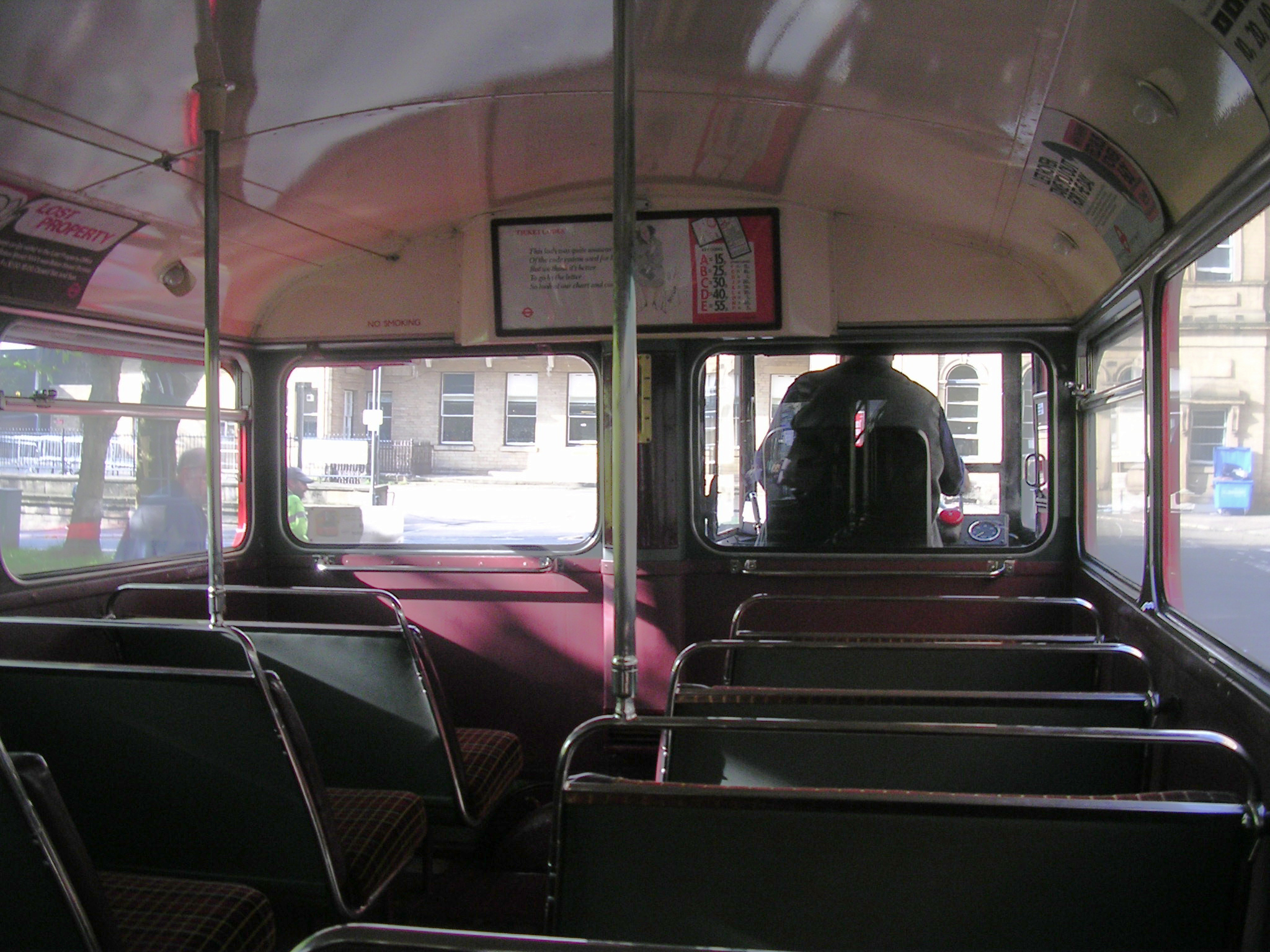 Lower deck